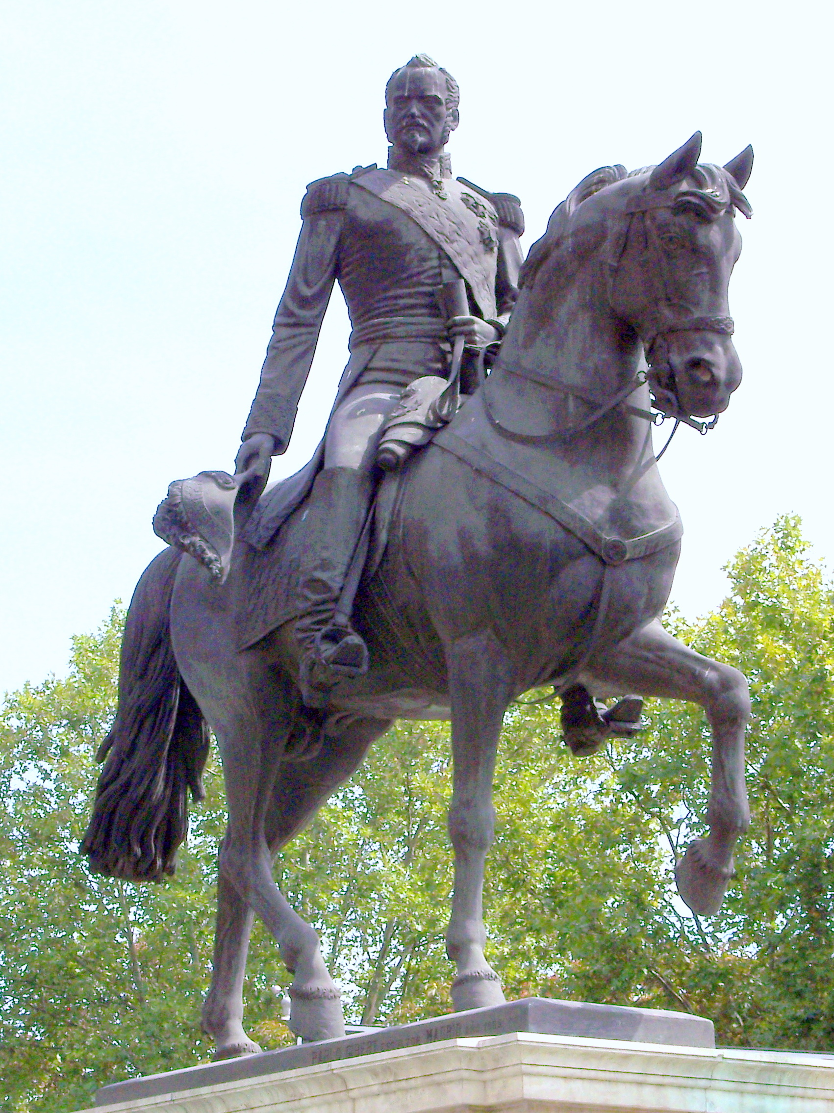 Estatua ecuestre del General Joaquín Baldomero Fernández Álvarez Espartero, Príncipe de Vergara, en Madrid, confluencia de la Calle Alcalá con la de Velázquez. Esculpida por Pablo Gibert y fundida en los talleres barceloneses de José Comas Blanc, 1886.